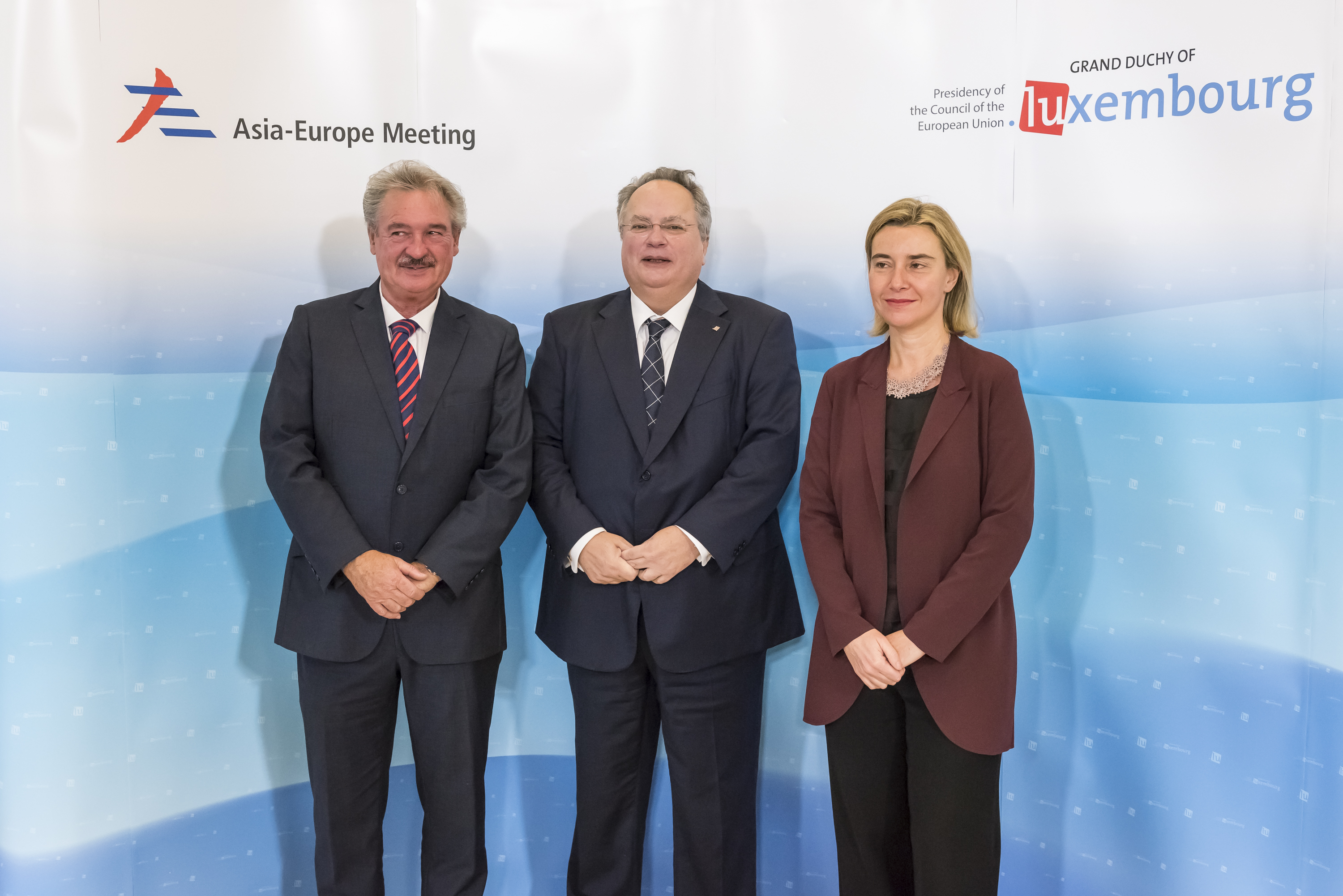 Υποδοχή του Υπουργού Εξωτερικών Ν. Κοτζιά στην 12η Υπουργική Σύνοδο ASEM από την Ύπατη Εκπρόσωπο της Ε.Ε., Federica Mogherini και τον Υπουργό Εξωτερικών και Μετανάστευσης του Λουξεμβούργου, Jean Asselborn (Λουξεμβούργο, 05-06.11.2015).